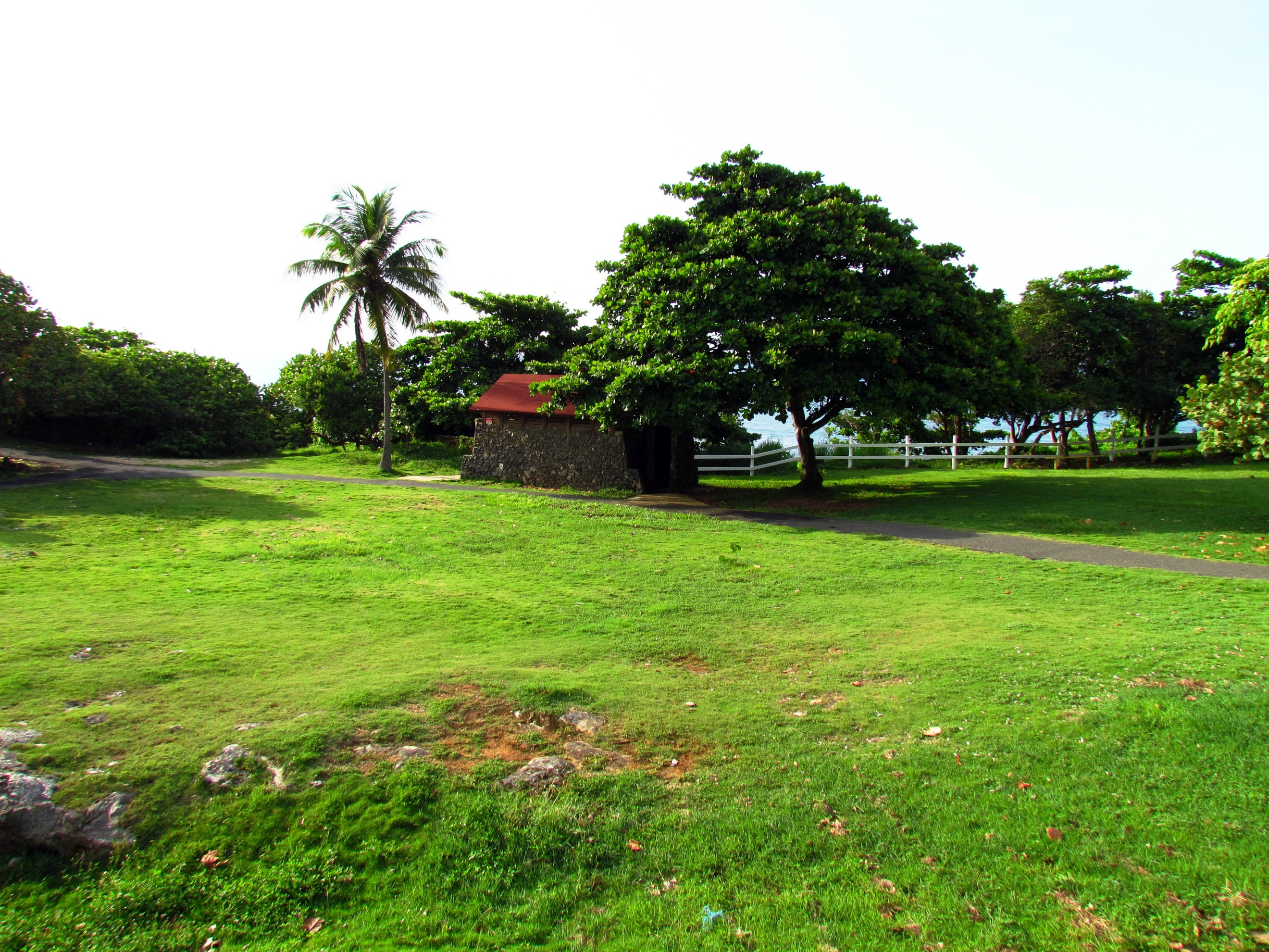 Area recreativa del Guajataca, Quebradillas, Puerto Rico